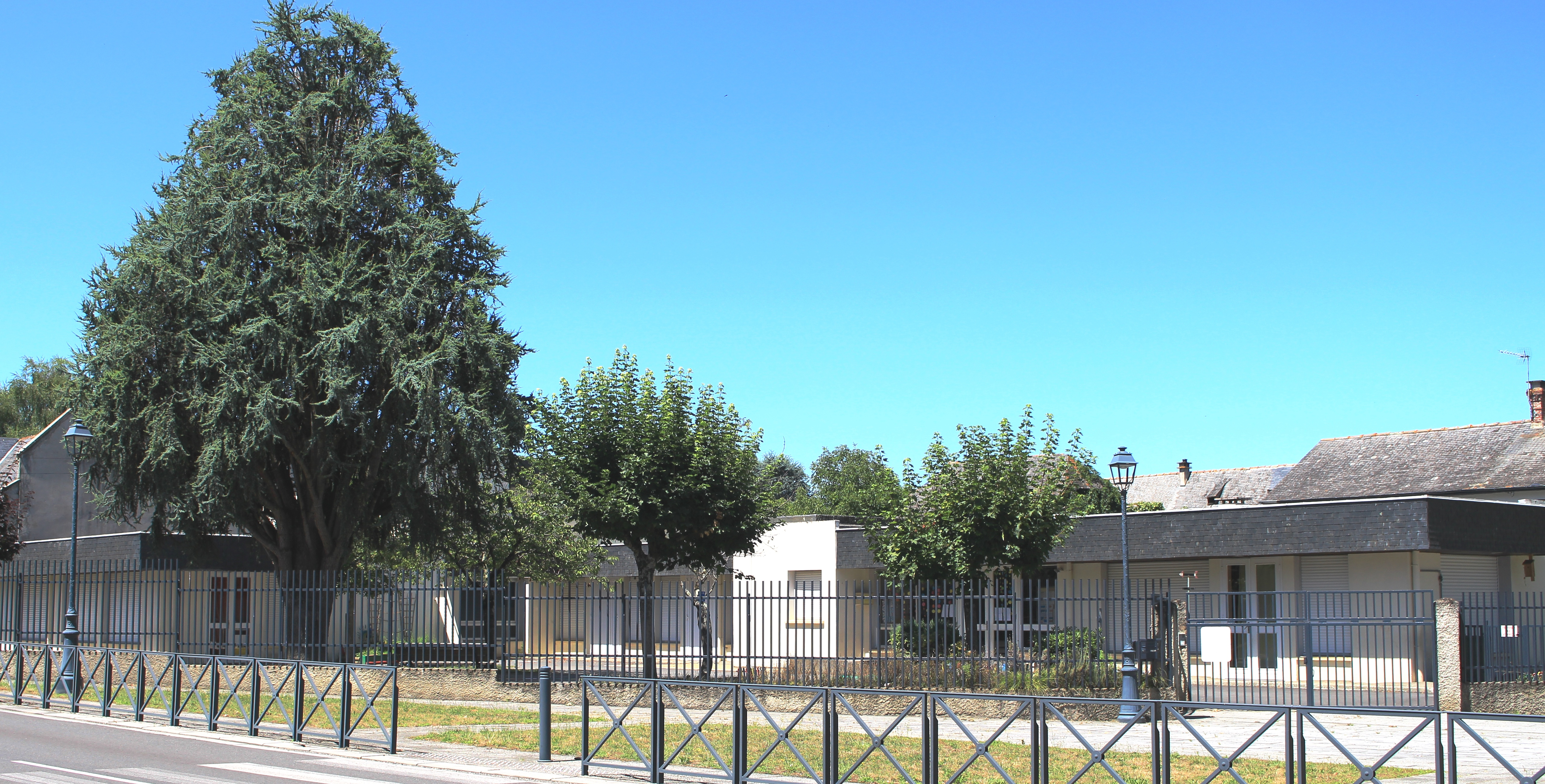 École de Laloubère (Hautes-Pyrénées)